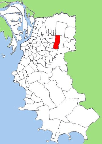 O bairro Jardim Itu-Sabará em Porto Alegre, Brasil.